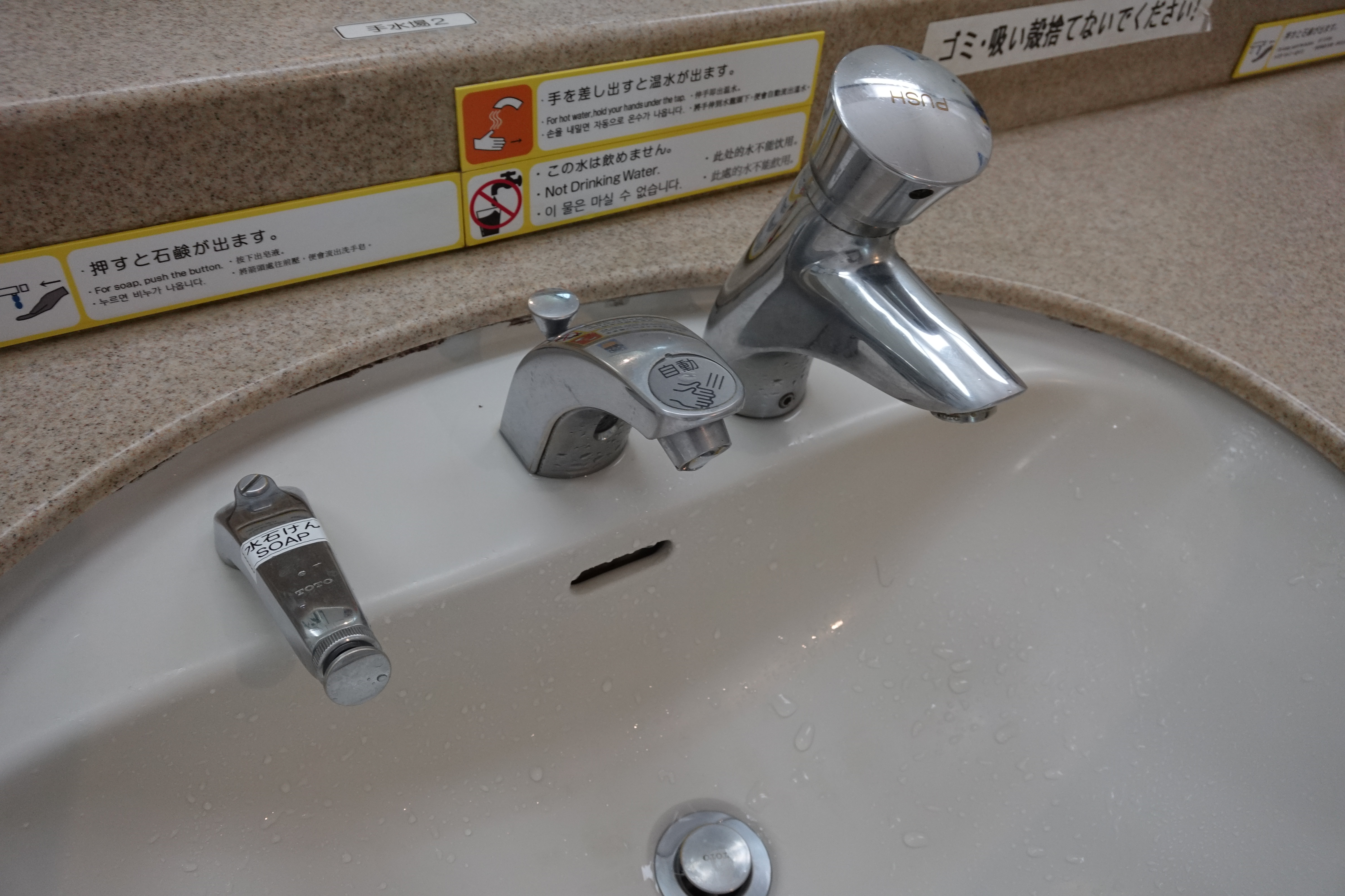 自動水栓 [1]